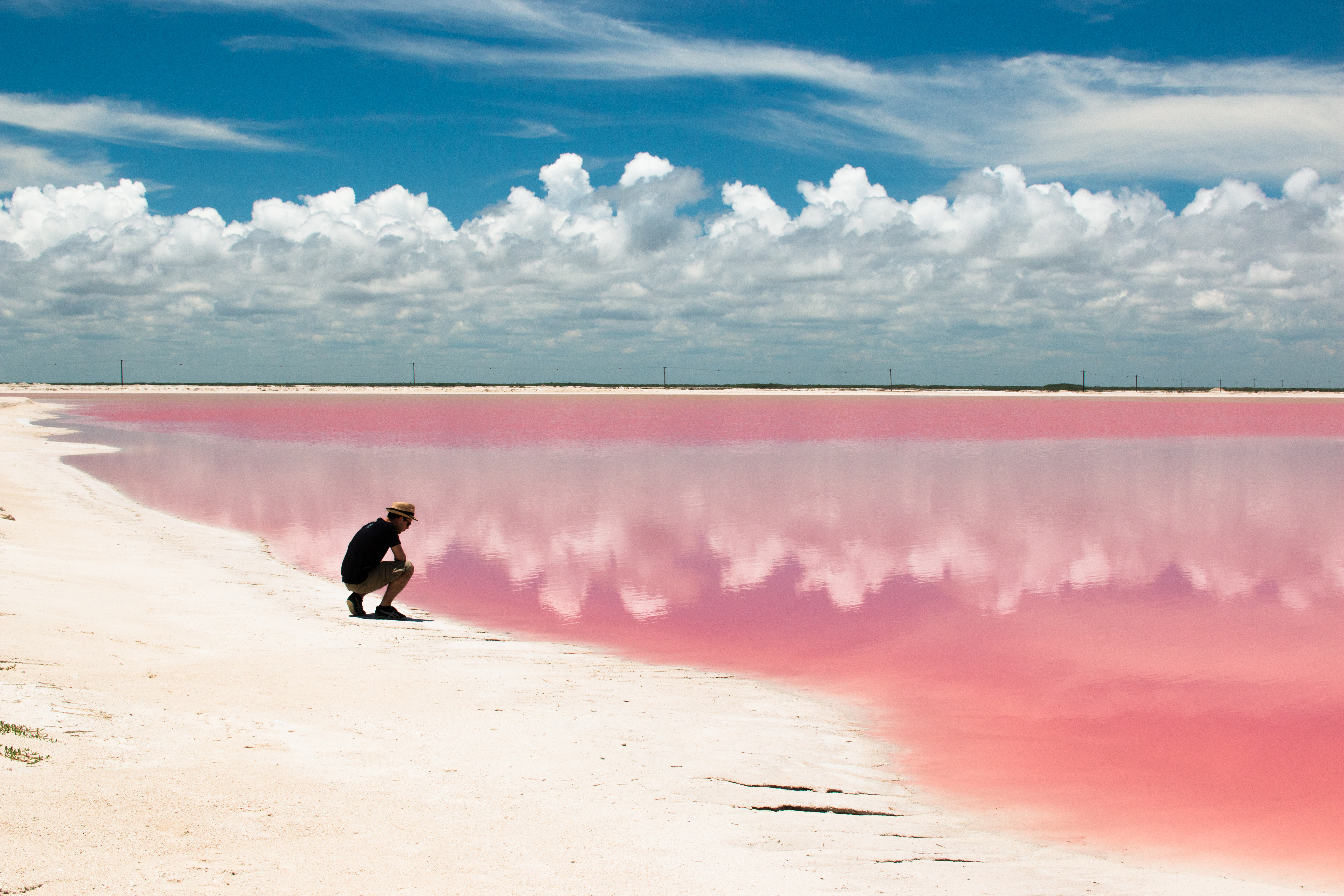 Las Coloradas